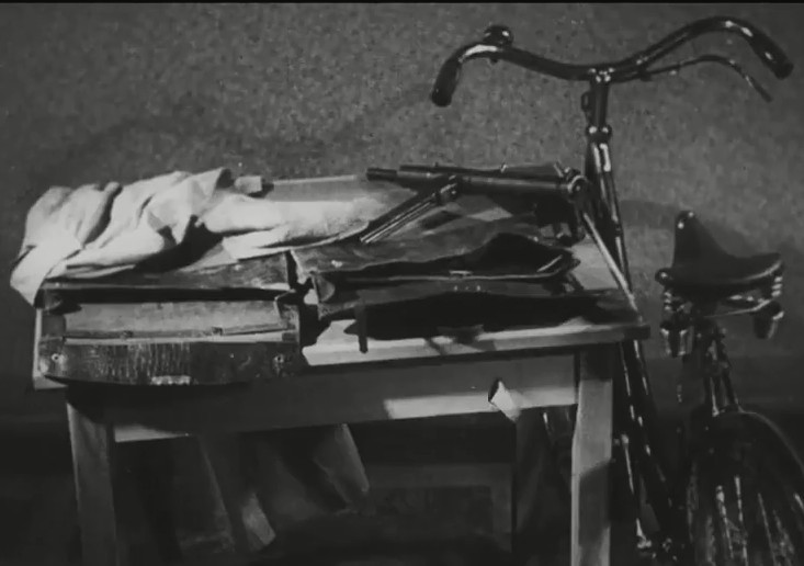 Вещественные доказательства с места покушения на Гейдриха 27 мая 1942 года